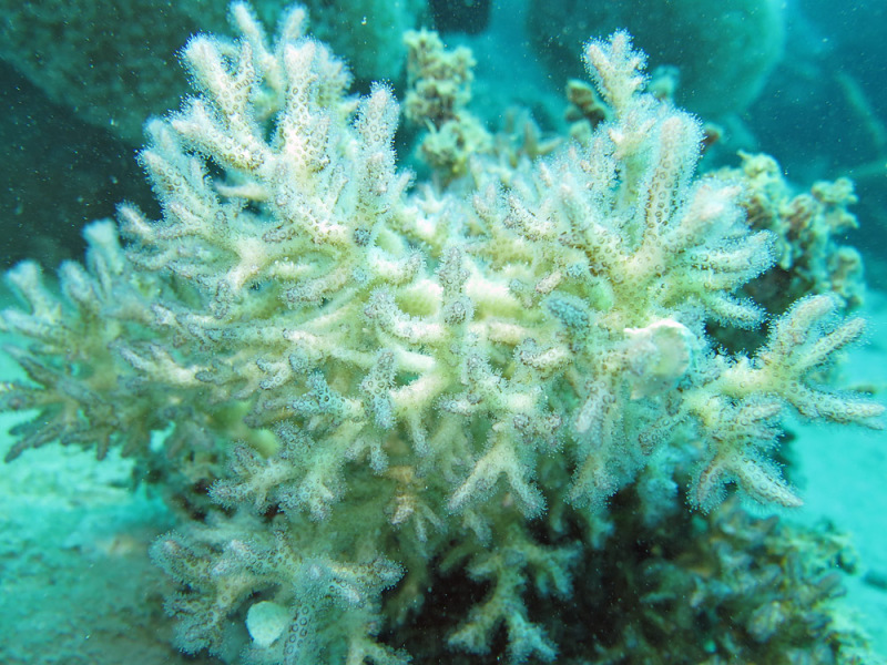 Colonia de Seriatopora hystrix con pólipos expandidos y una coloración inusual blanco-azulada, en isla Lizard, Australia